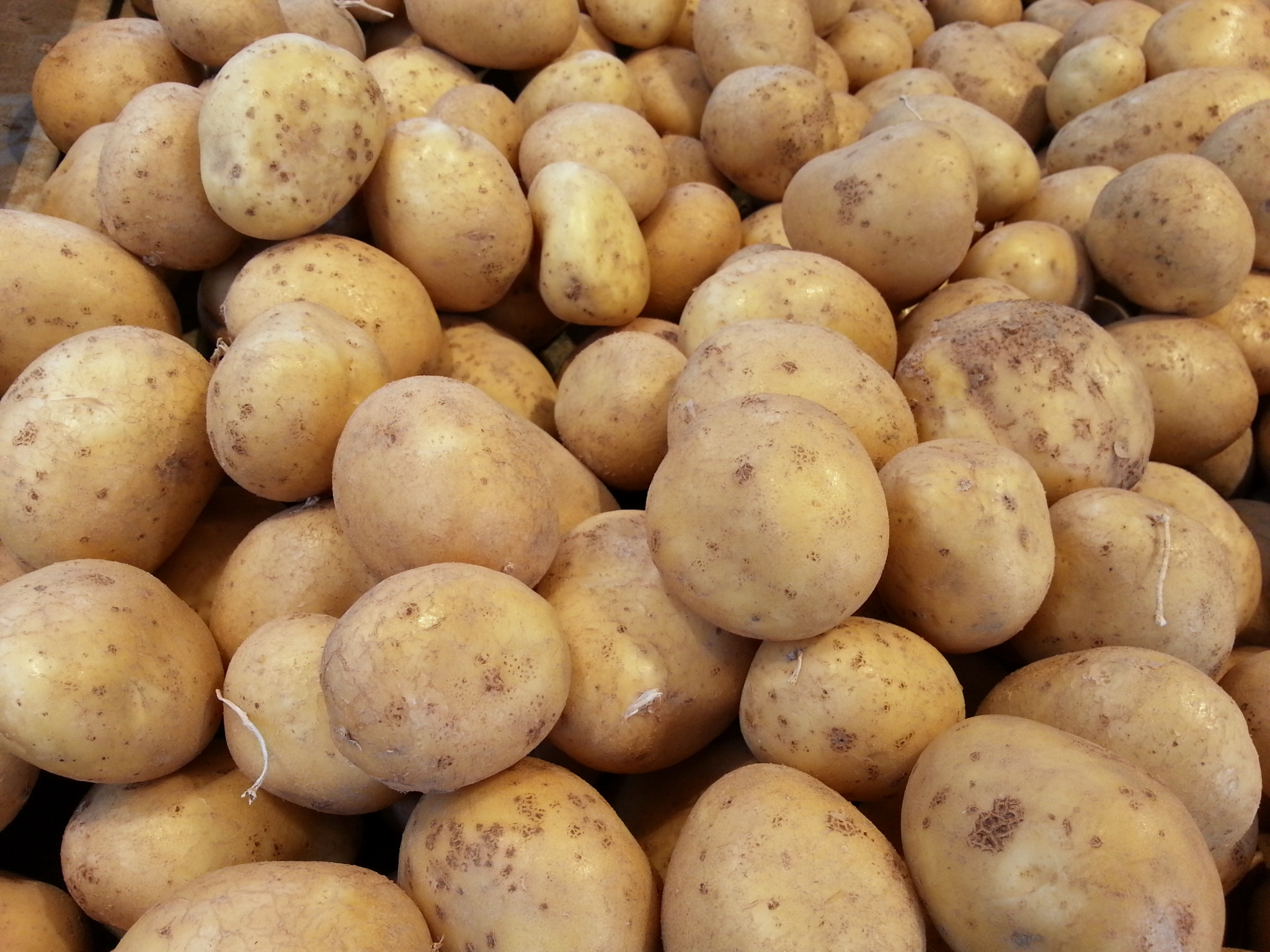 Kartoffeln der Sorte Linda.